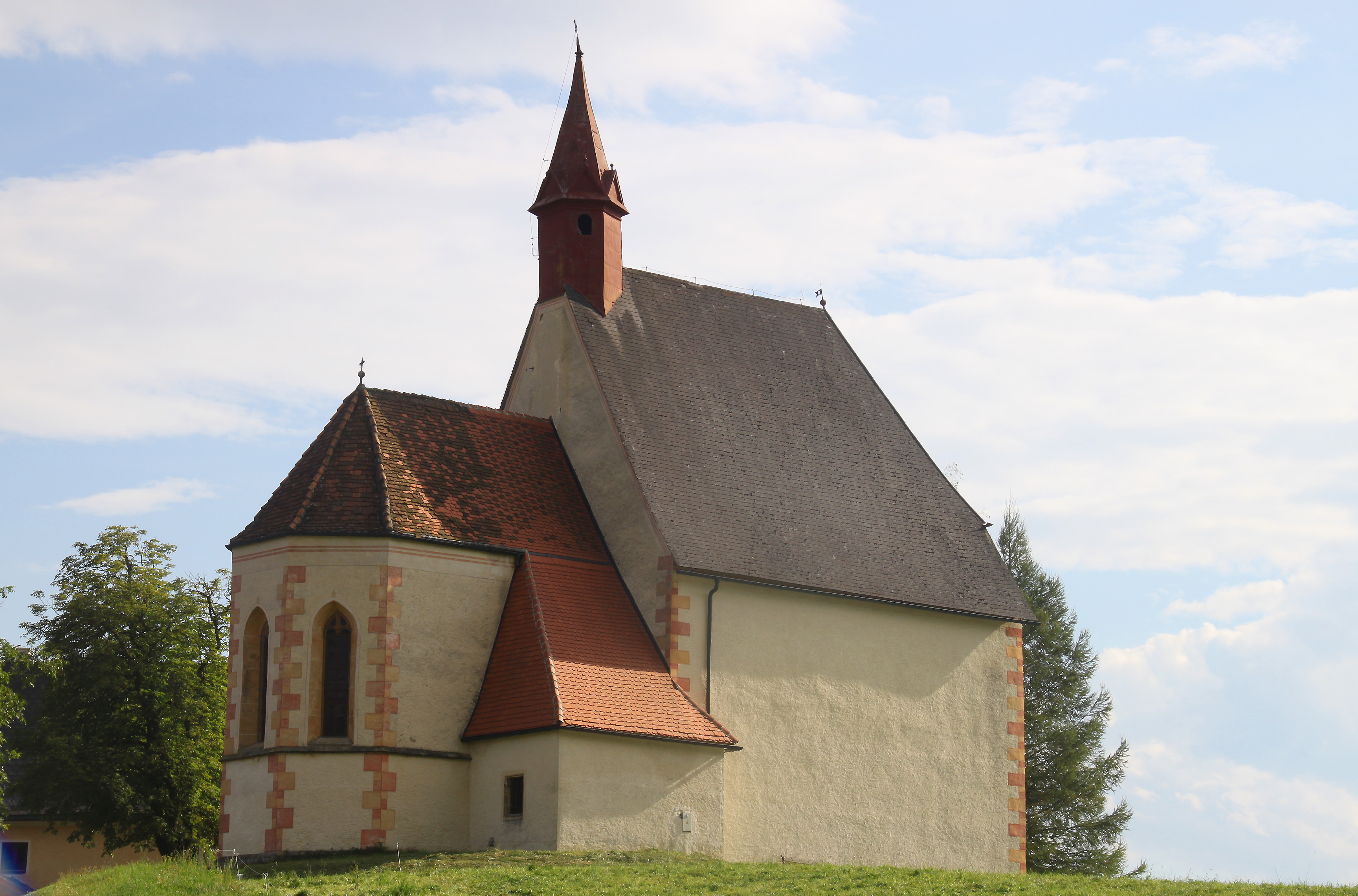 Filialkirche Sankt Martha, Sankt Marein bei Knittelfeld